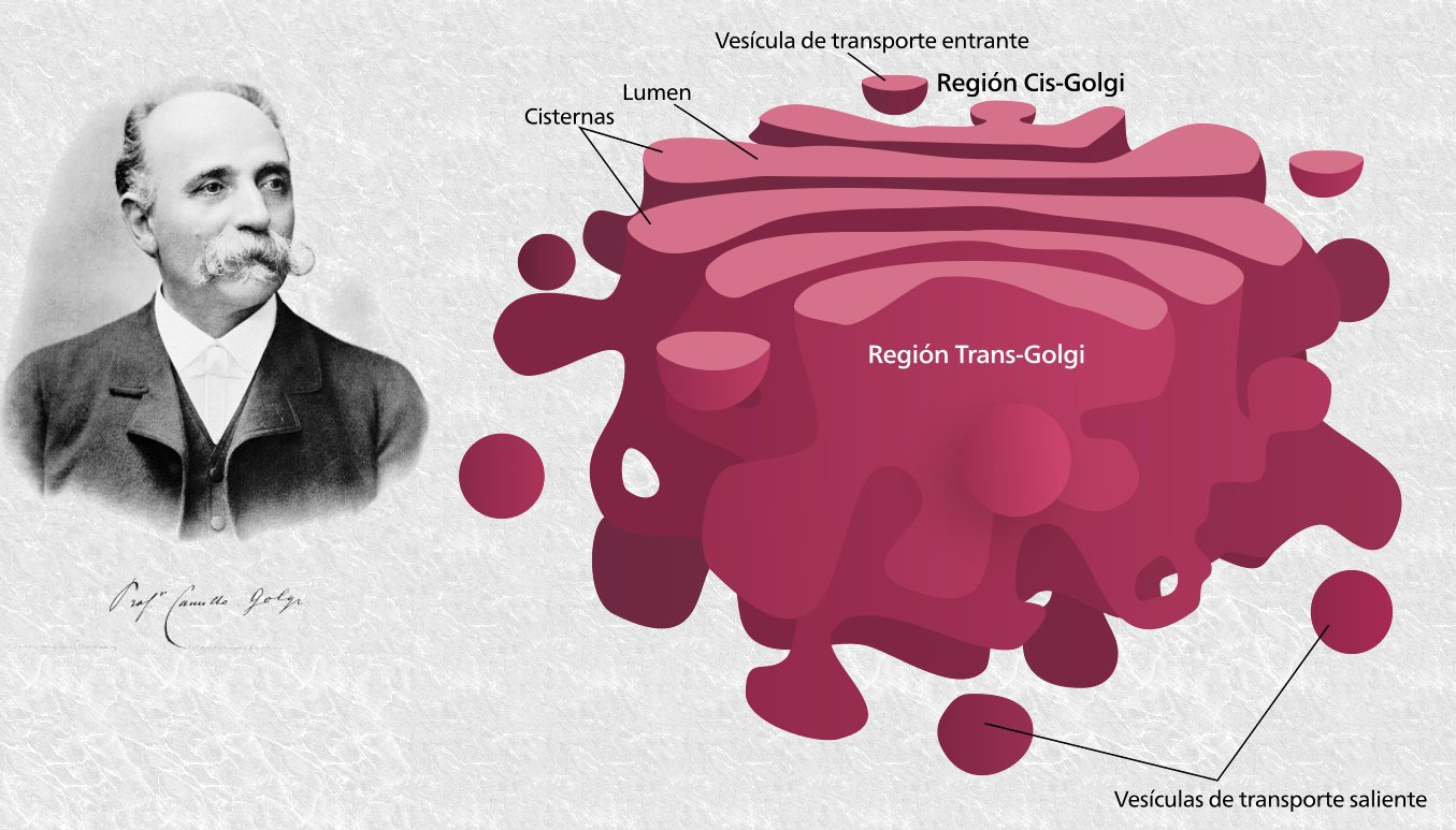 Camilo Golgi (1843-1926). Premio Nobel de Medicina y Fisiología en 1906. Descubrió el orgánulo celular que lleva su nombre